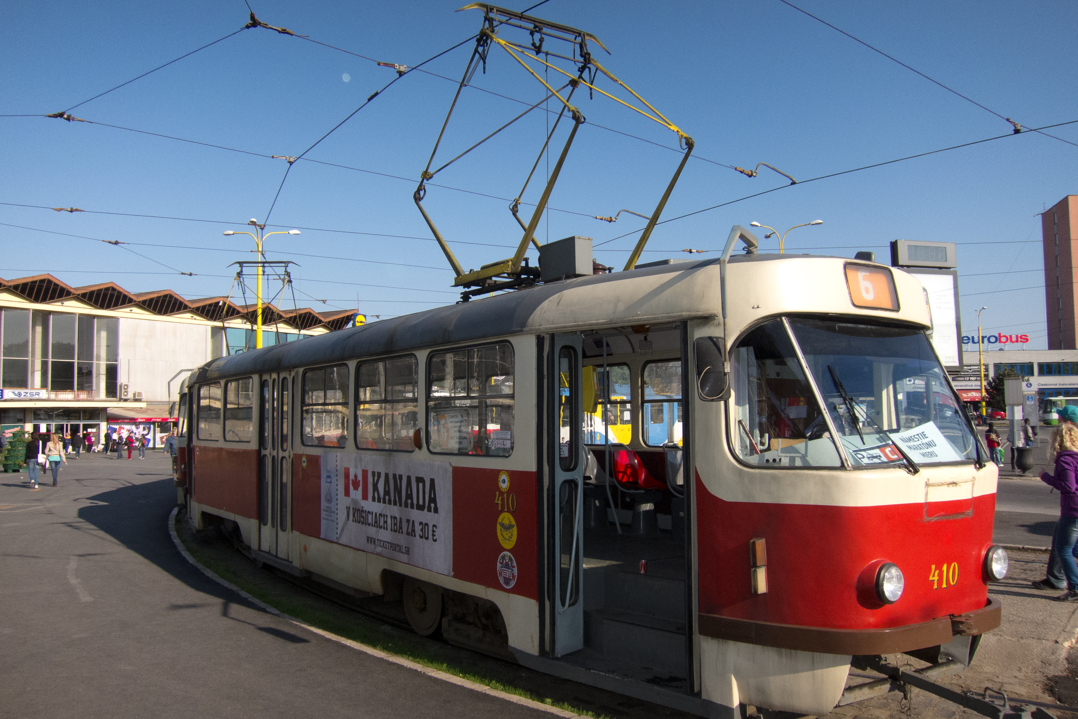 Souprava tramvají Tatra T3SUCS č. 410+411, Košice